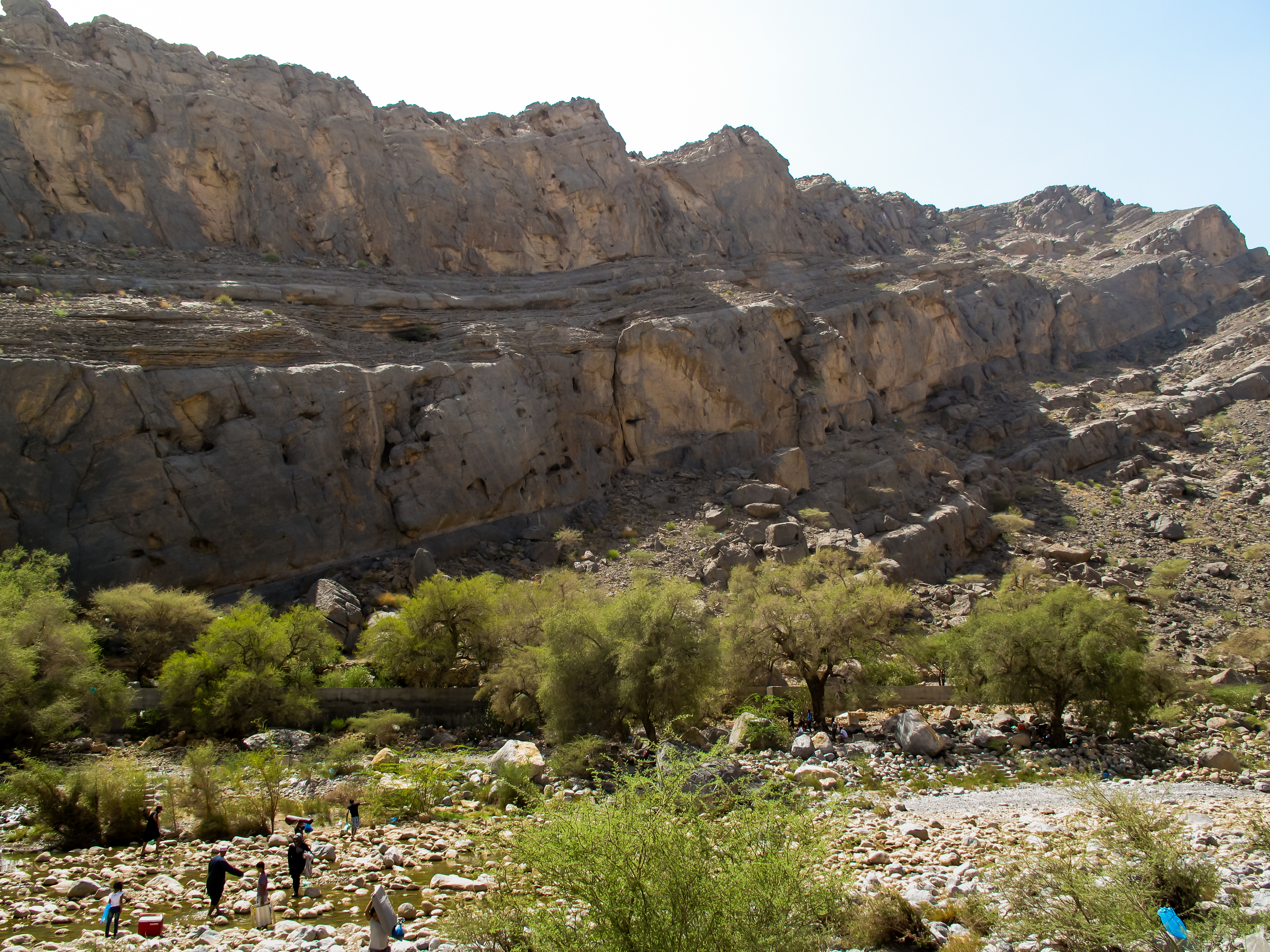 Wadi Tanuf